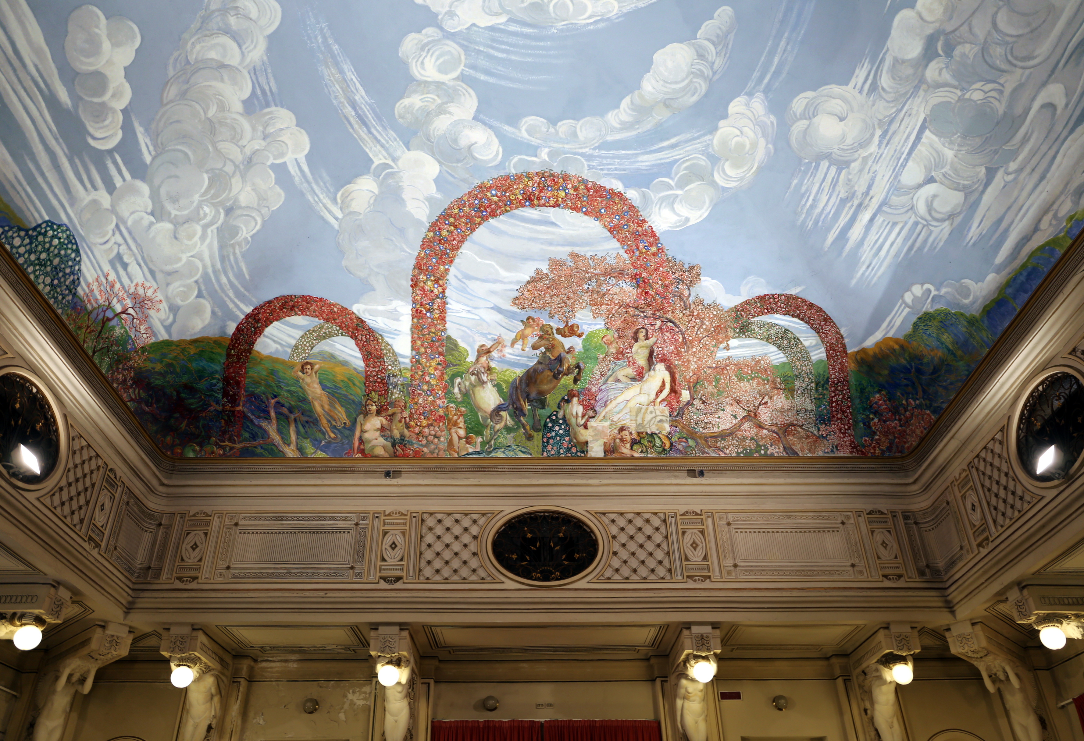 Palazzo dei Congressi (Salsomaggiore Terme) This is a photo of a monument which is part of cultural heritage of Italy.